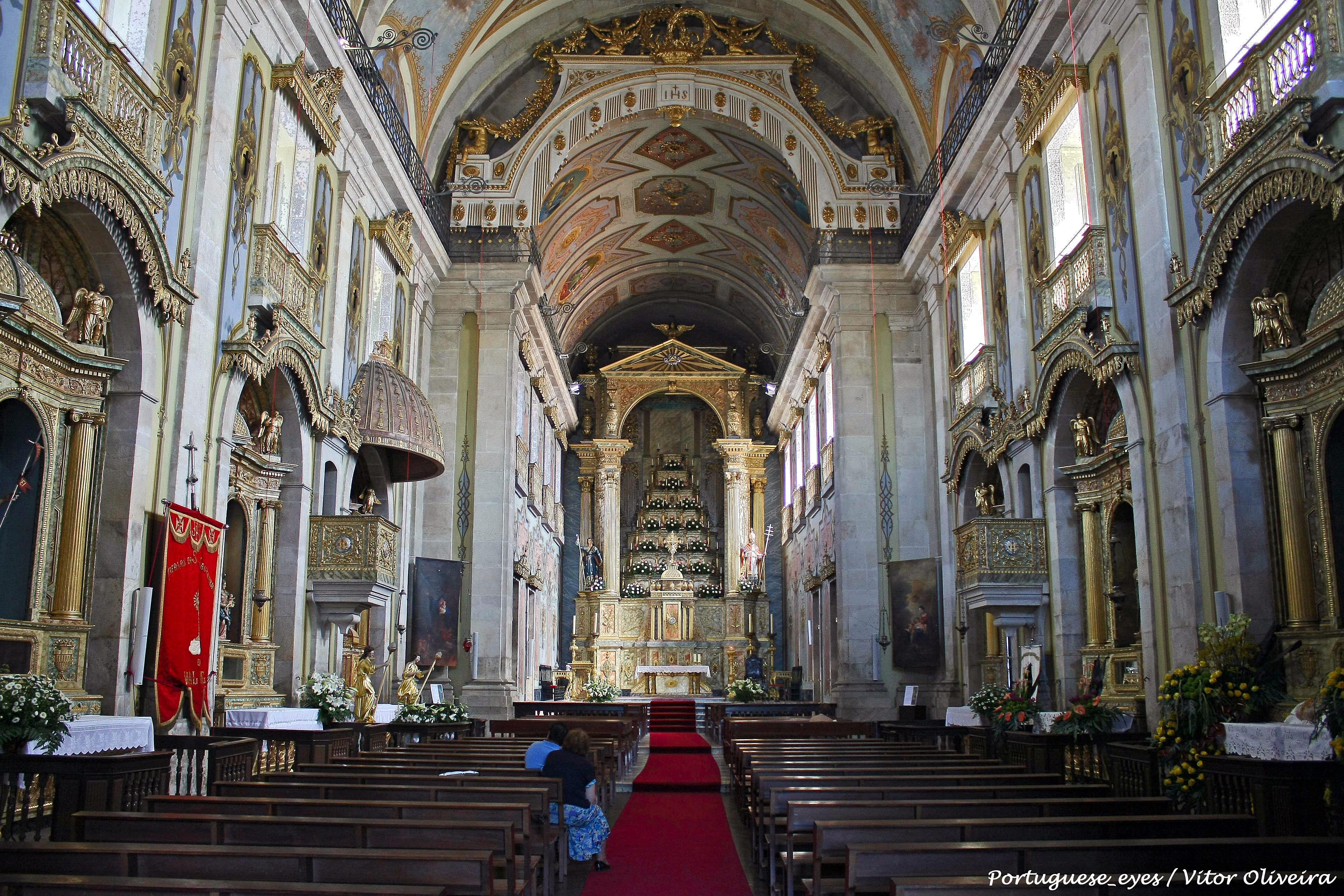 Em 1837 a sua sacristia serve as primeiras reuniões camarárias do novo concelho de Valongo. Contribuíram para a construção desta igreja, as monjas do Mosteiro de S. Bento de Avé Maria do Porto e o produto do labor dos padeiros de Valongo. As suas paredes, com mais de dois séculos já passados e apesar da sua altura superior a vinte metros ainda mantêm todo o seu prumo e alinhamento. O corpo central é coroado por um frontão triangular com a imagem de S. Mamede complementada com quatro painéis de azulejos, representativos da vida do santo, que ladeiam as torres sineiras. O amplo pórtico de forma retangular é todo ele rematado em cantaria e encimado por três amplos janelões sendo o central ornamentado por azulejo com as armas de S. Pedro. Entre 2009 e 2010, sofreu de uma grande intervenção a nível da cobertura e da nave, onde foram intervencionadas as pinturas as paredes laterais e abóboda. Nesta mesma altura, foi feito o restauro do órgão de tubos.